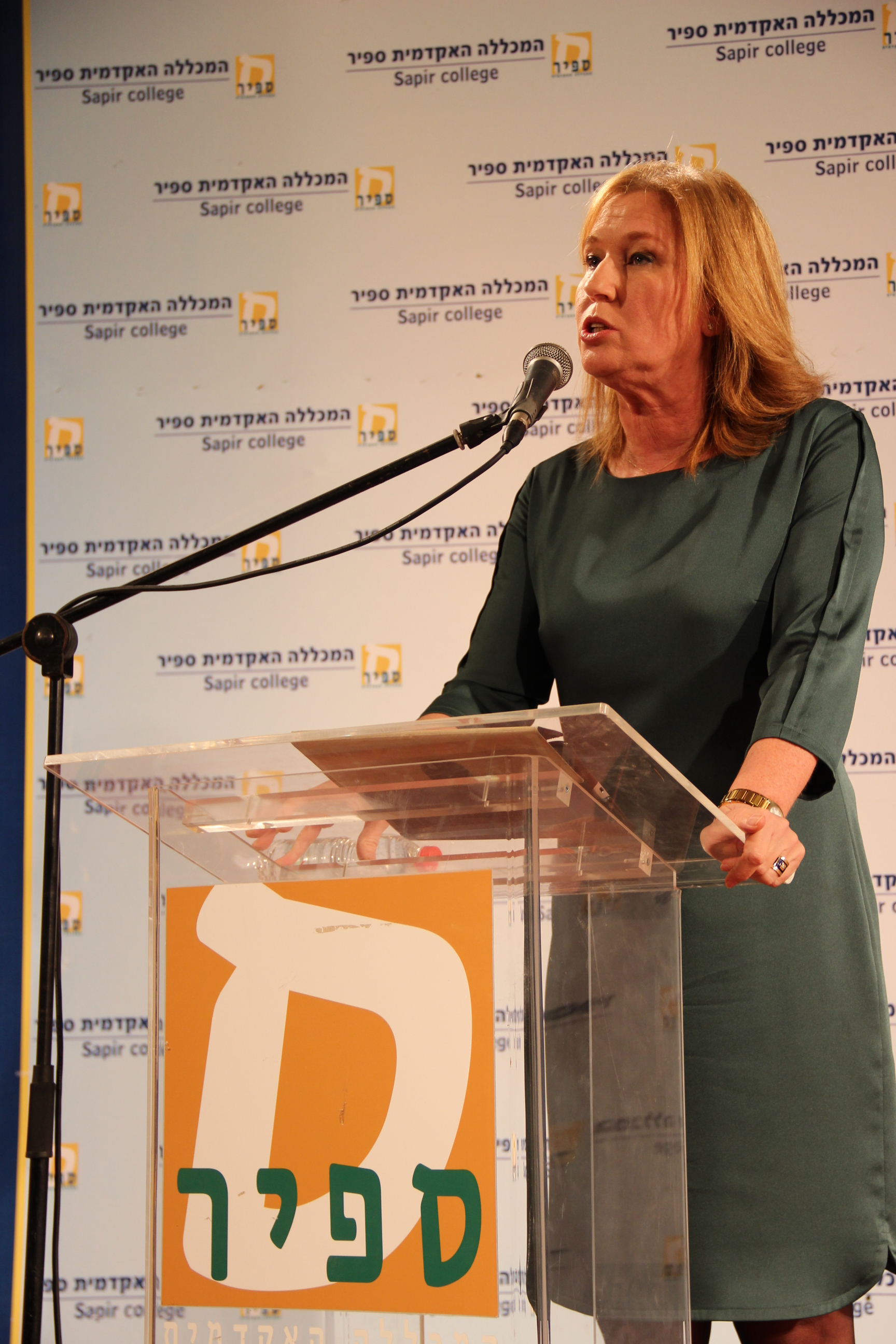 כנס שדרות לחברה במכללה האקדמית ספיר ובעיר שדרות 2015